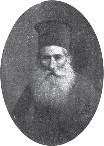 Христо Попхристов, участник в Охридското съзаклятие.